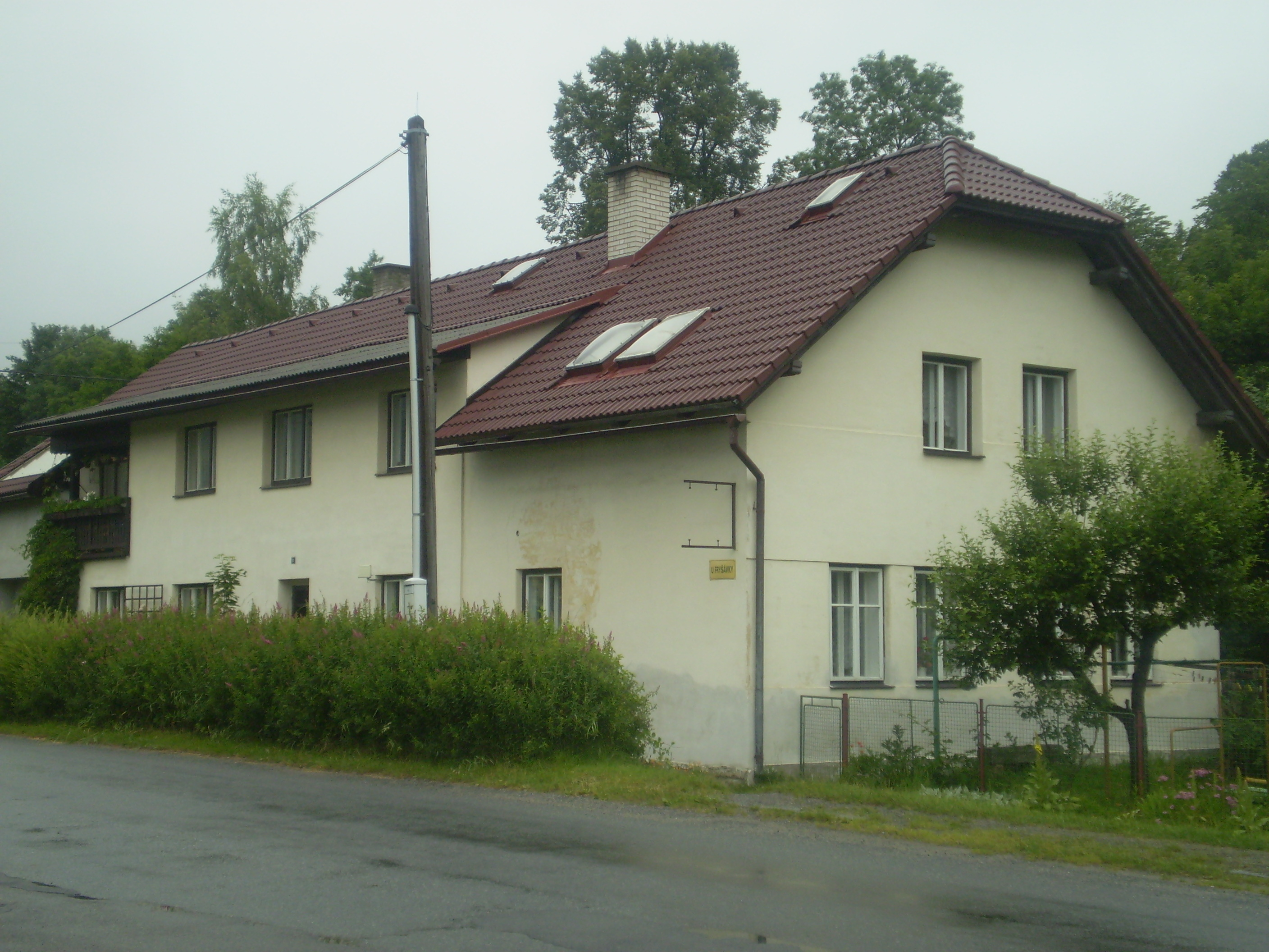 budova bývalých jimramovských lázní. U Fryšávky 53.